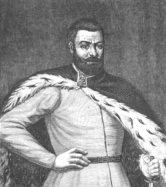 Grzegorz Chodkiewicz, great hetman of Lithuania